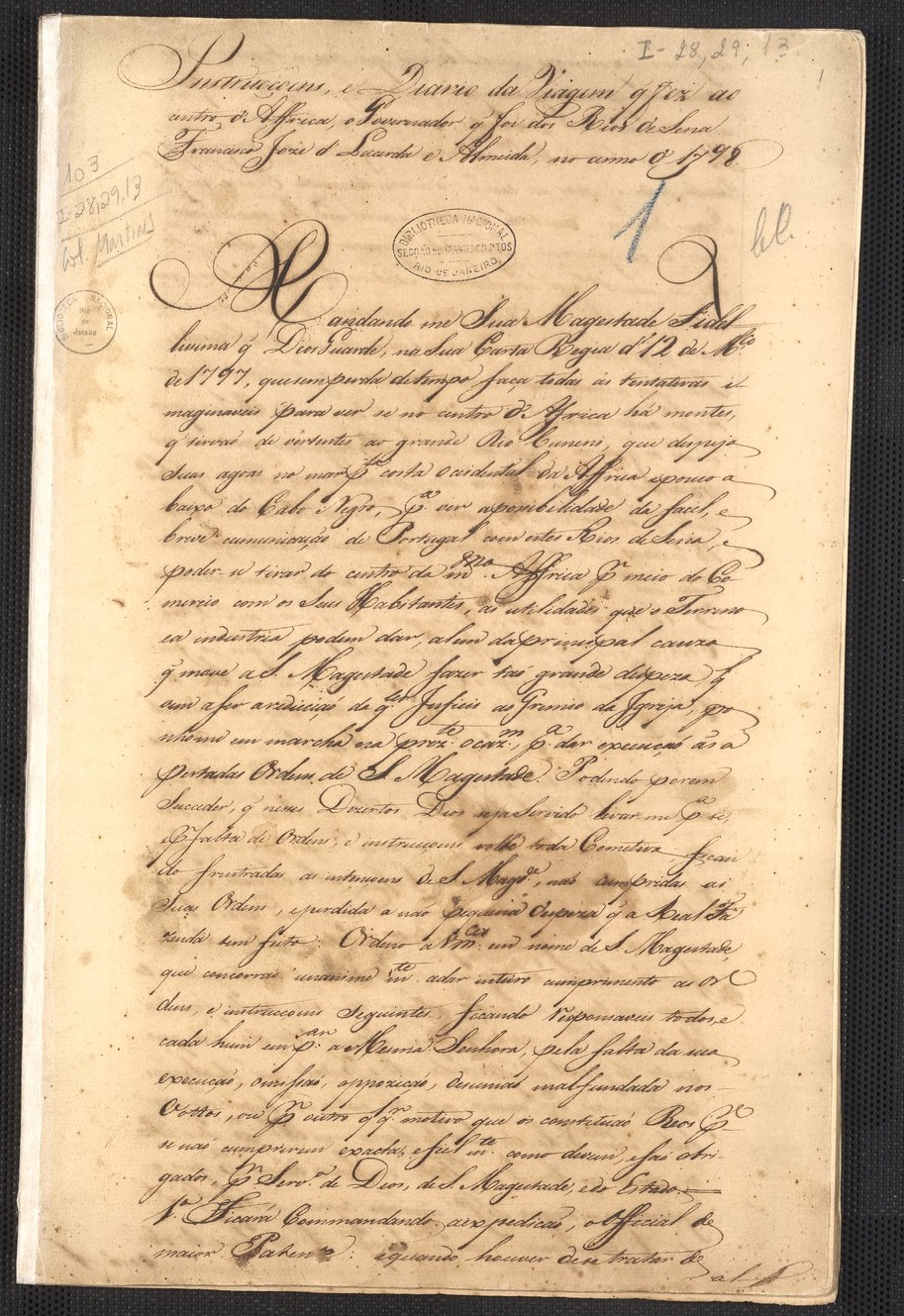 Journal de voyage de Lacerda e Almeida